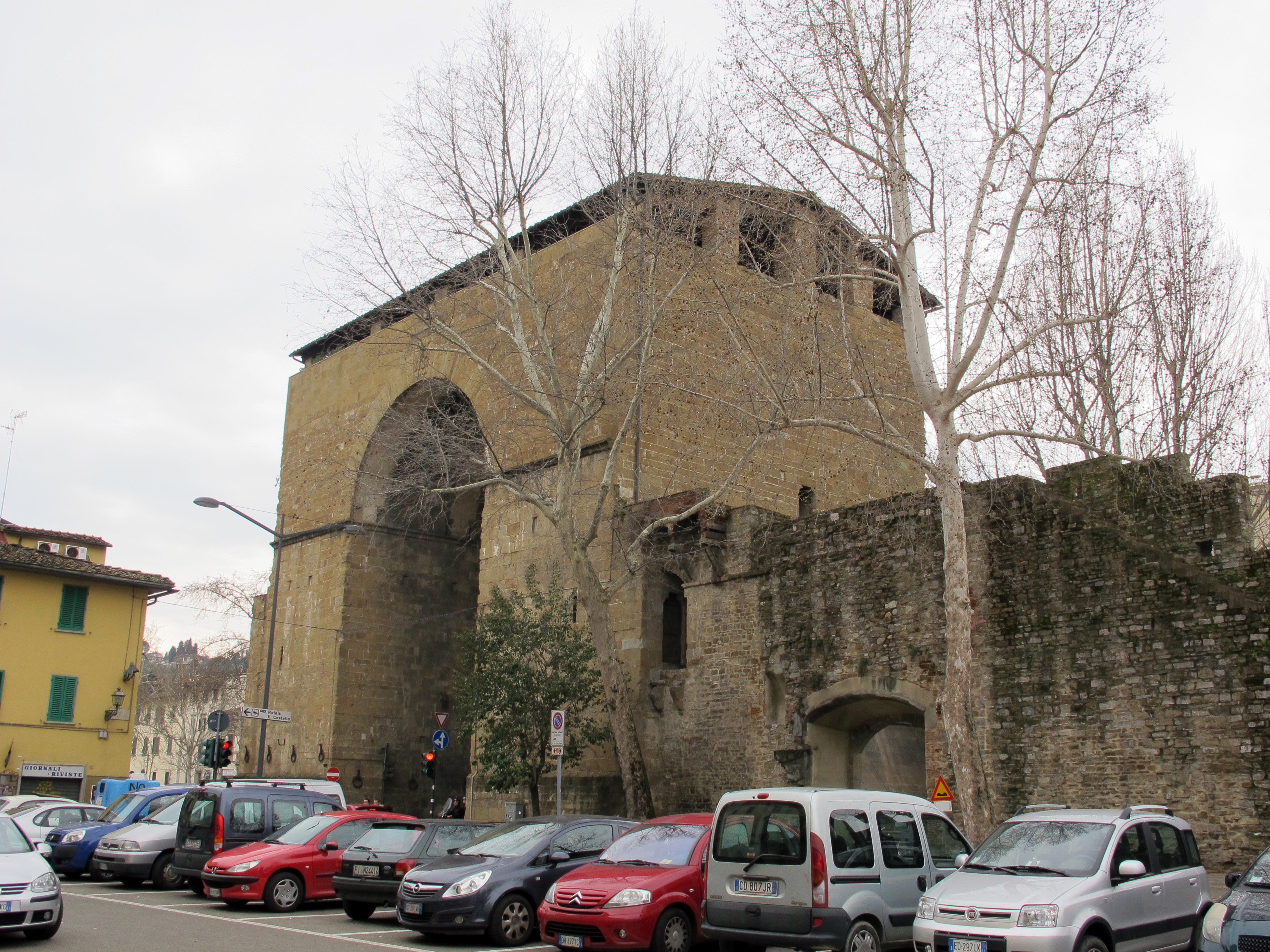 Porta s. frediano